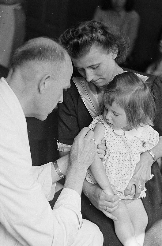 Original image description from the Deutsche FotothekKinder beim Gruppenimpfen (Pockenschutz)